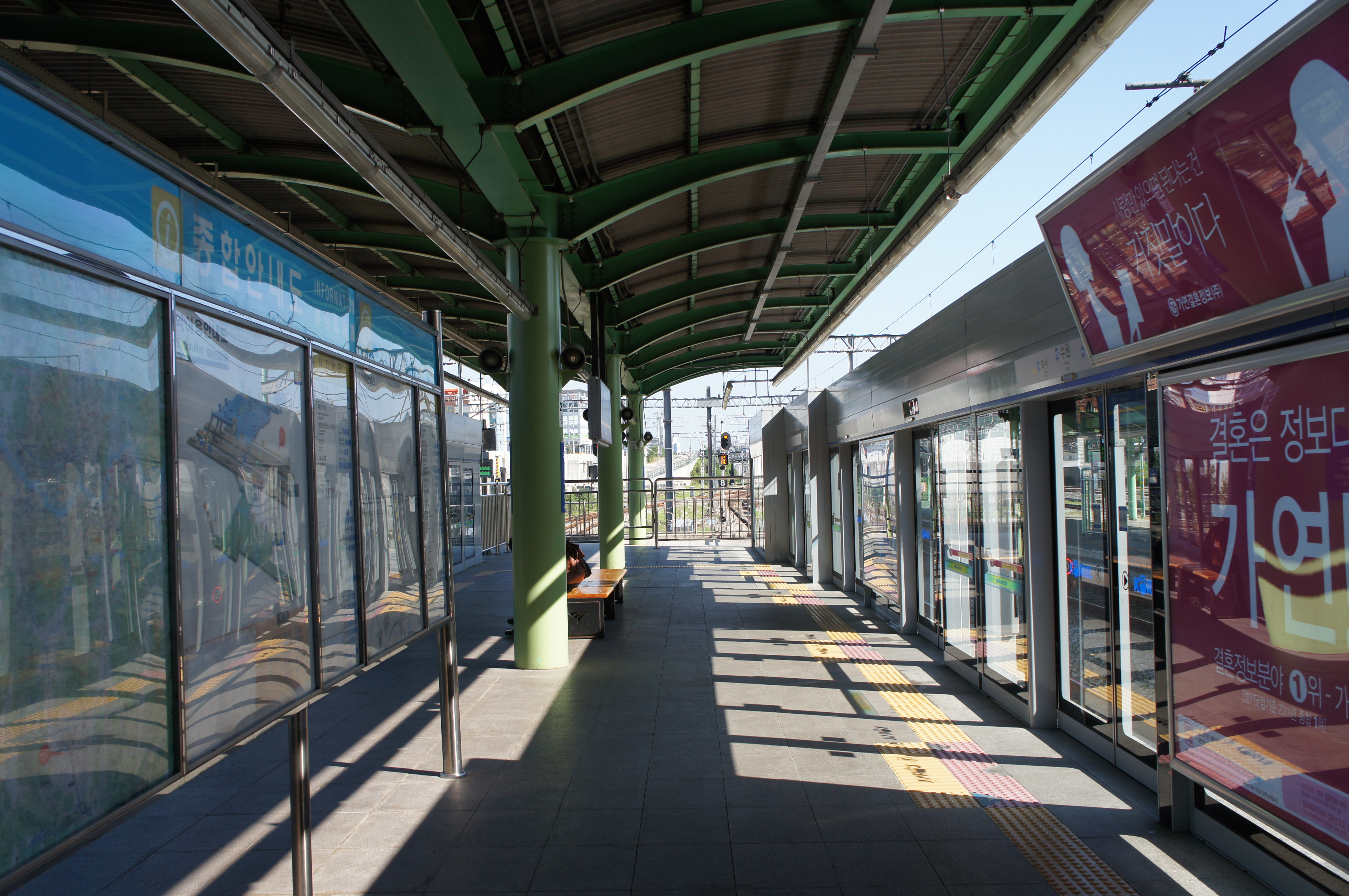 수원역 1호선 승강장